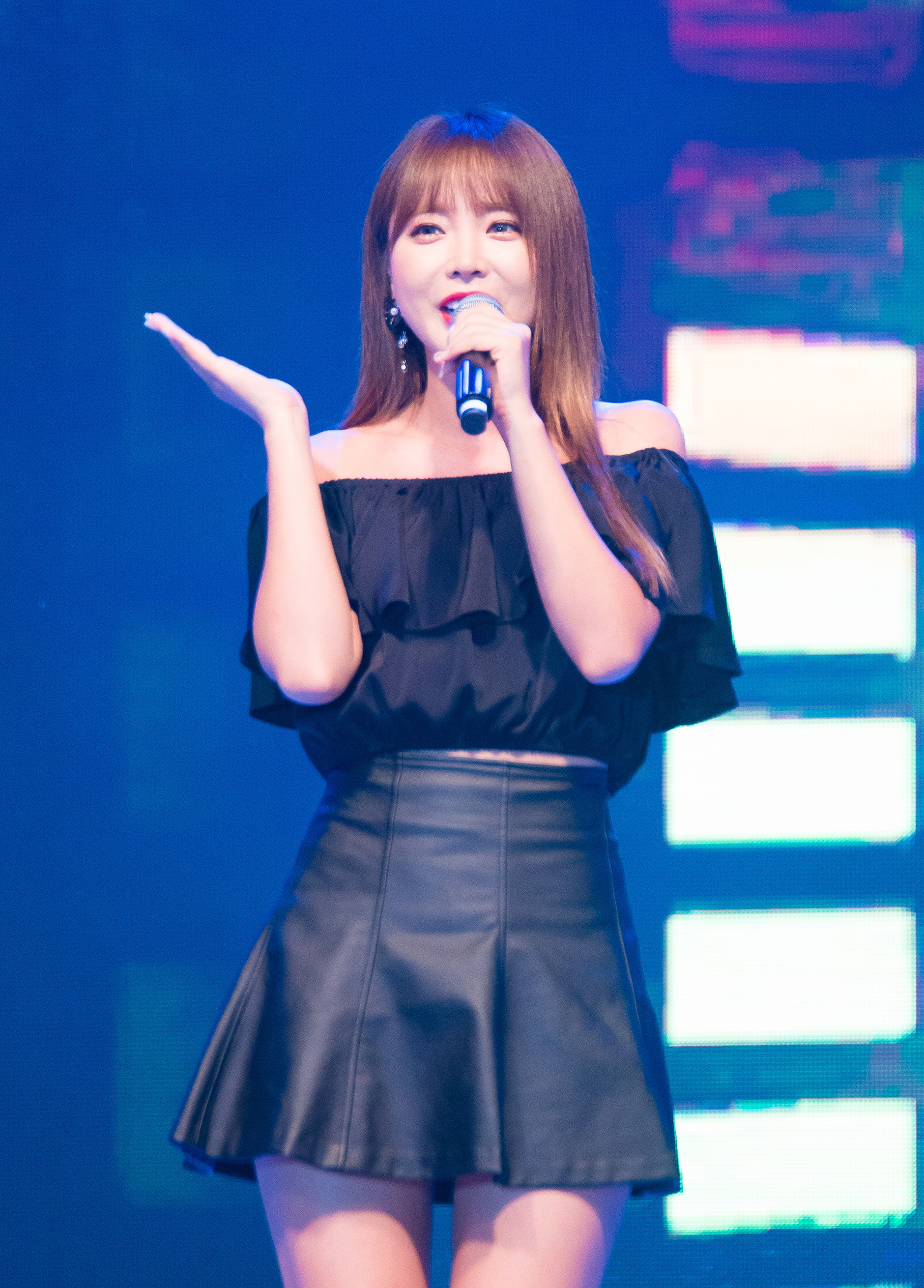 20170624 홍진영 제천문화축제